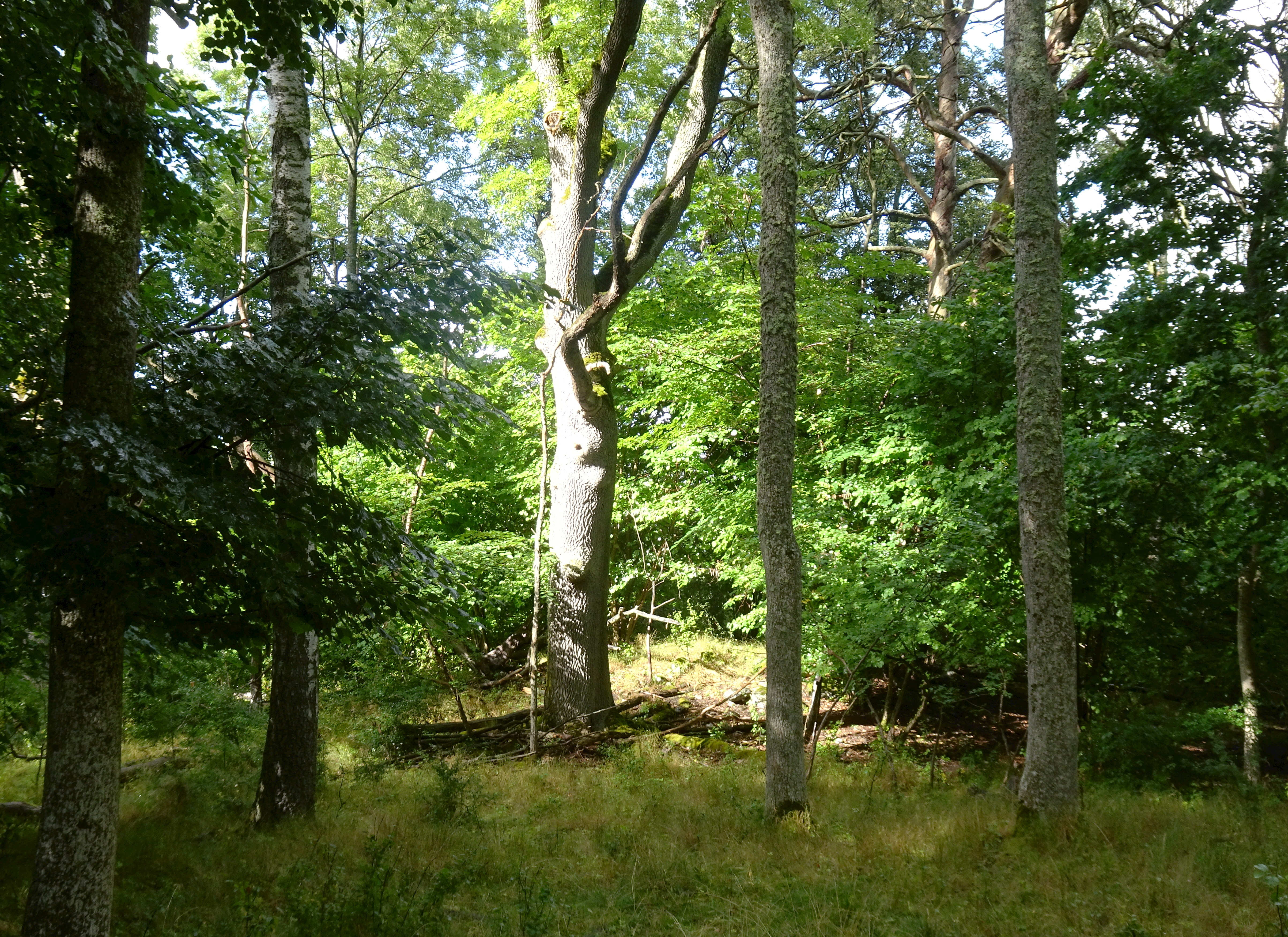 Ådö-Lagnö naturreservat